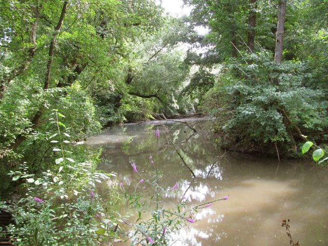 Panoramablick auf den Hausener Auwald